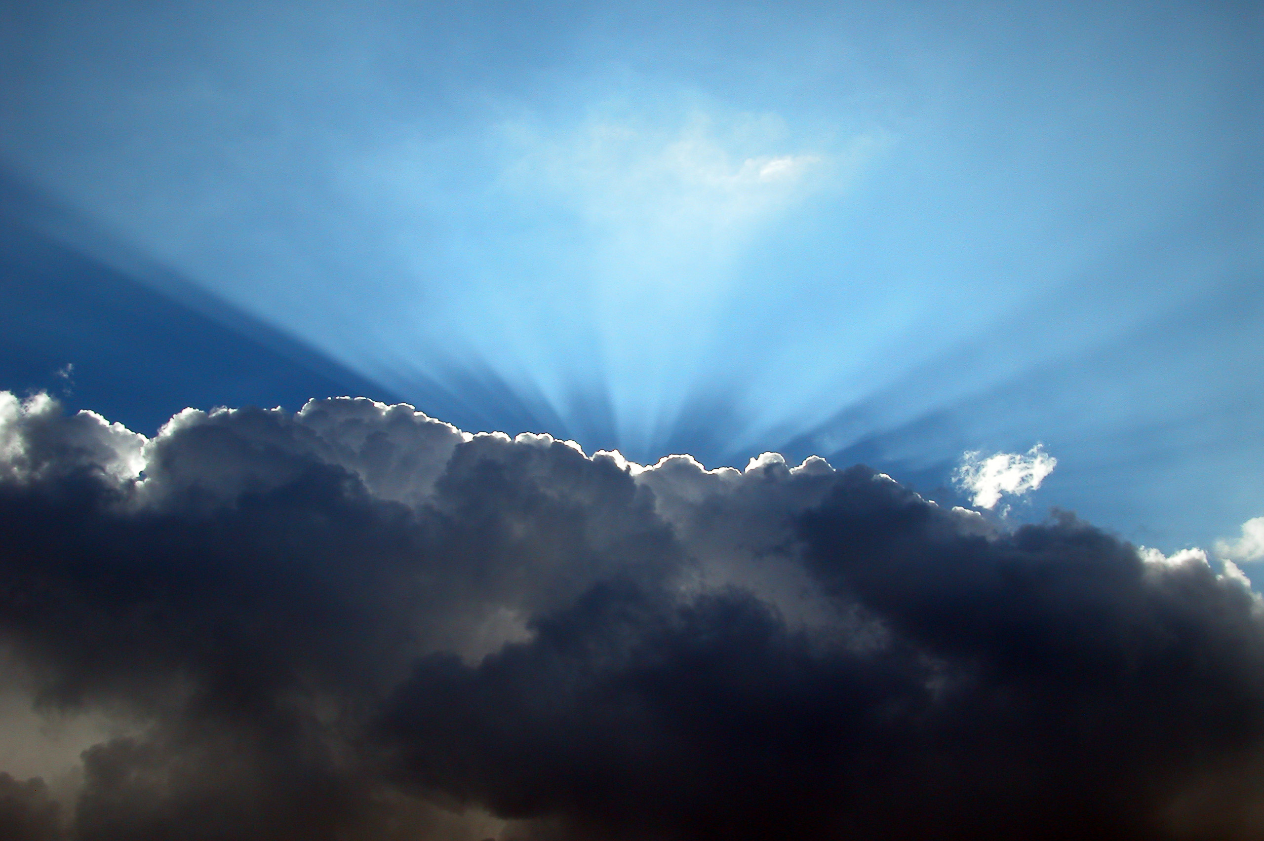 Crepuscular rays